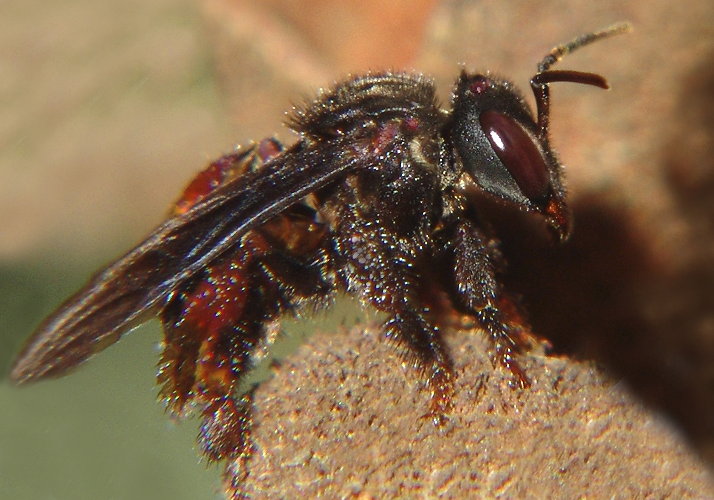 Trigona spinipes - abelha-cachorro, abelha-de-cachorro, abelha-irapuá, abelha-irapuã, arapica, arapu, arapuá, arapuã, axupé, caapuã, cabapuã, enrola-cabelo, guaxupé, irapuá, mel-de-cachorro, torce-cabelo e urapuca.